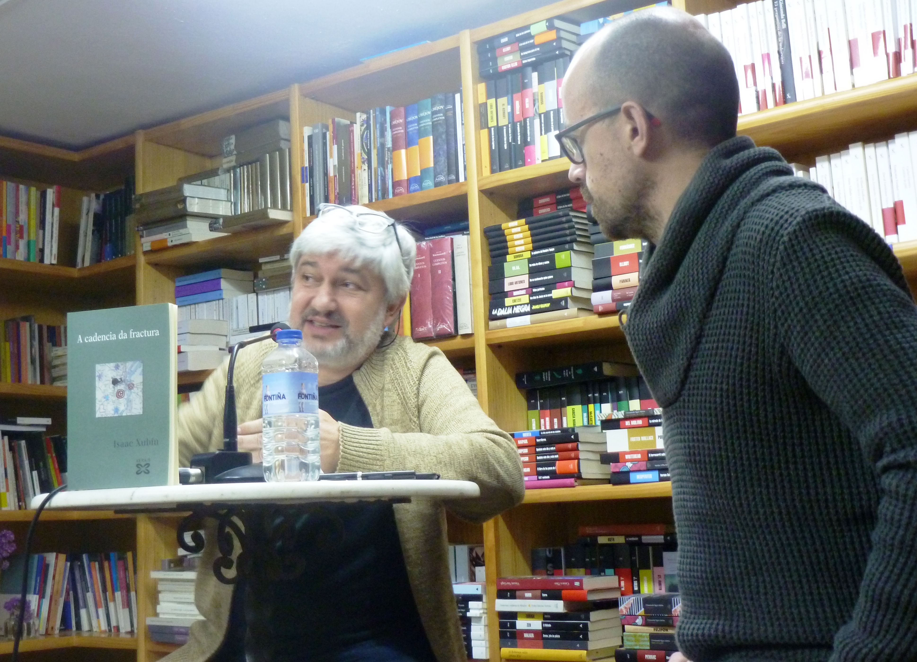 Isaac Xubín con Fran Alonso